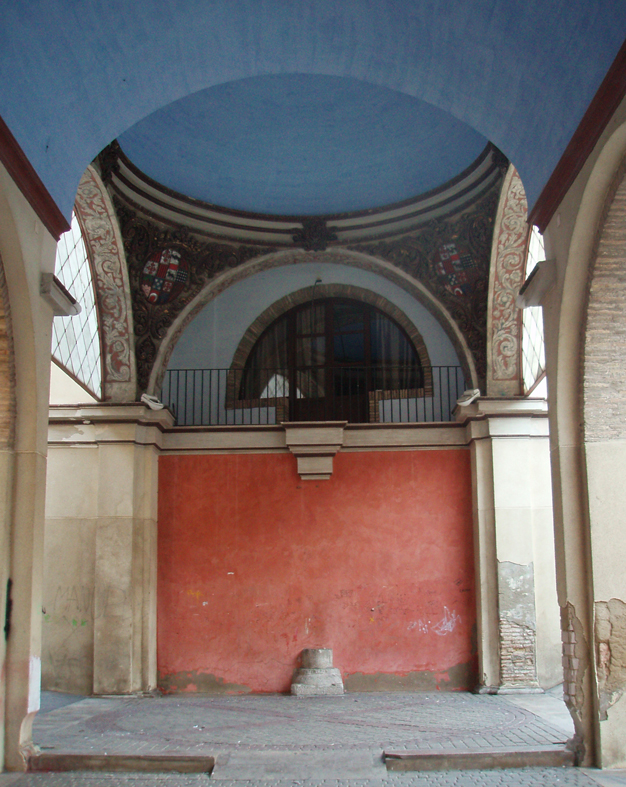 Parte interior del Convento de San Antón (Tudela) en 2010 (restauración de la estructura en la década de 1990)